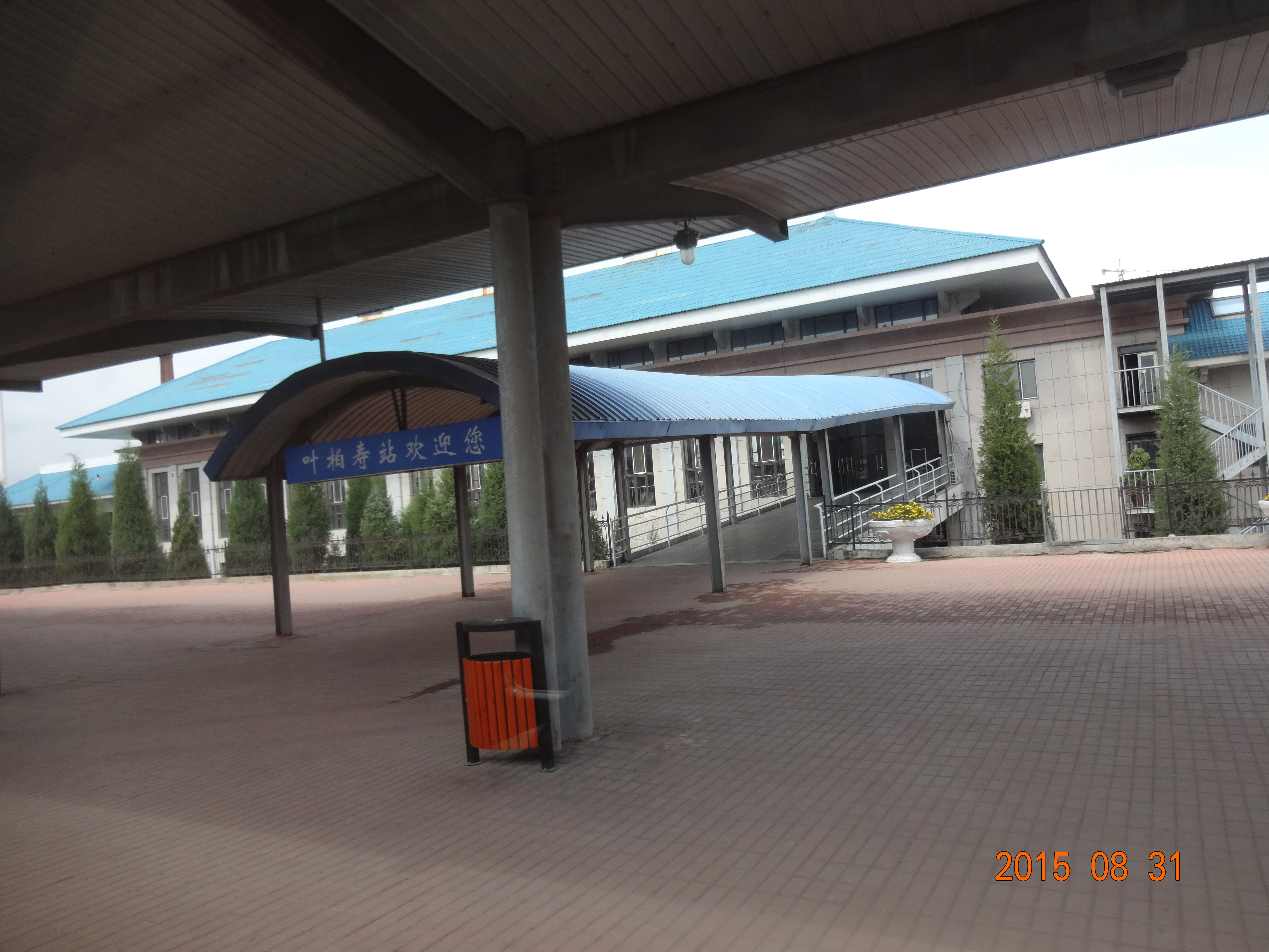 叶柏寿站